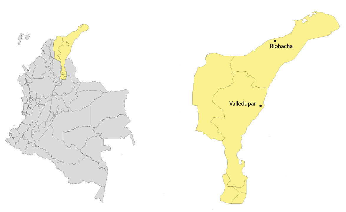 Eje musical del Caribe Oriental